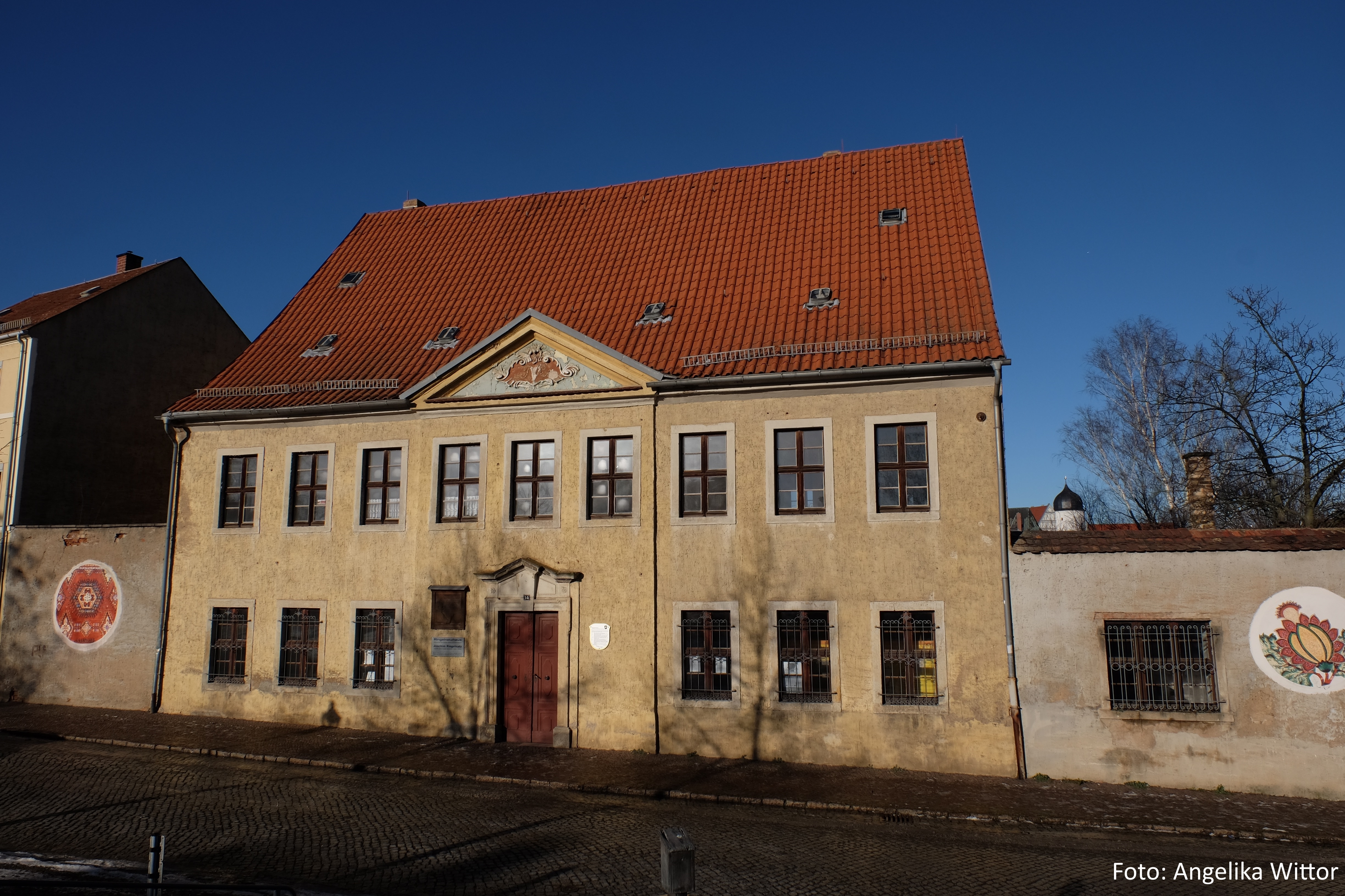 Vereinssitz, Ringelnatz-Geburtshaus, Crostigall 14, Wurzen